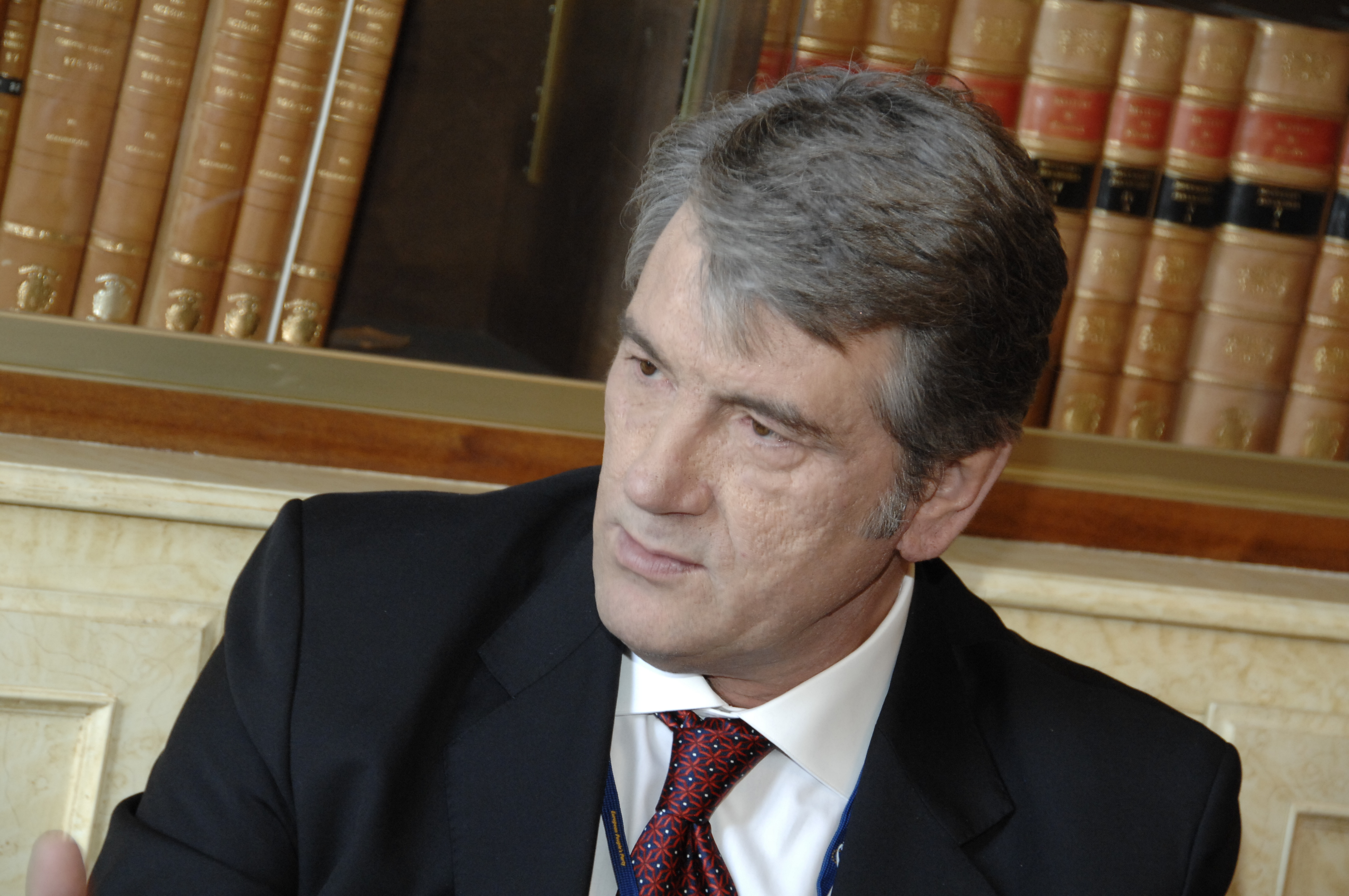 EPP Summit 19 March 2009